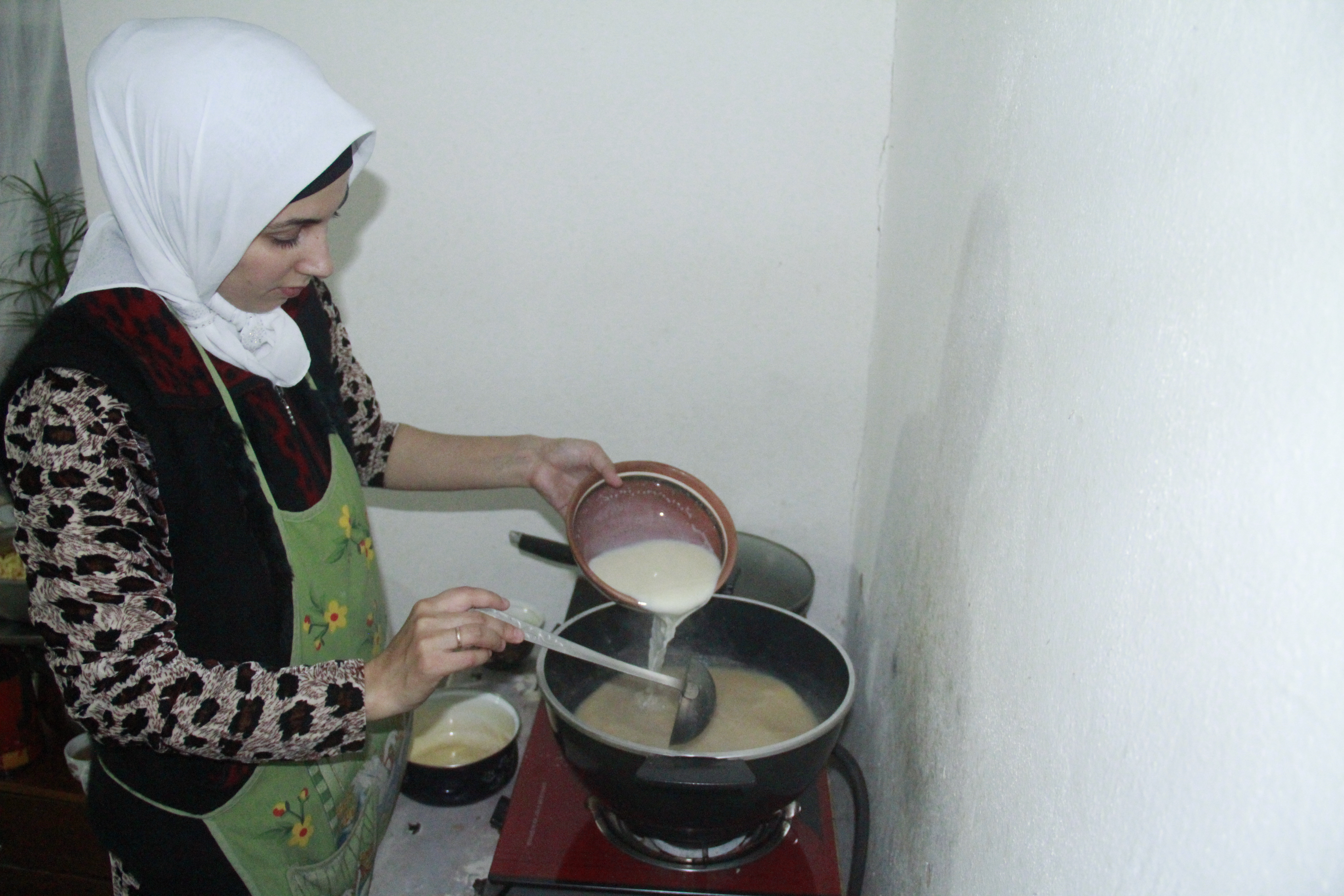 Тоҷикӣ: Ордбирён (5)